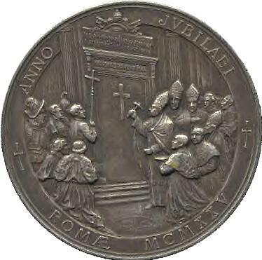 Пий XI Пий XI на церемонии празднования одного из юбилейных лет (1925-го)